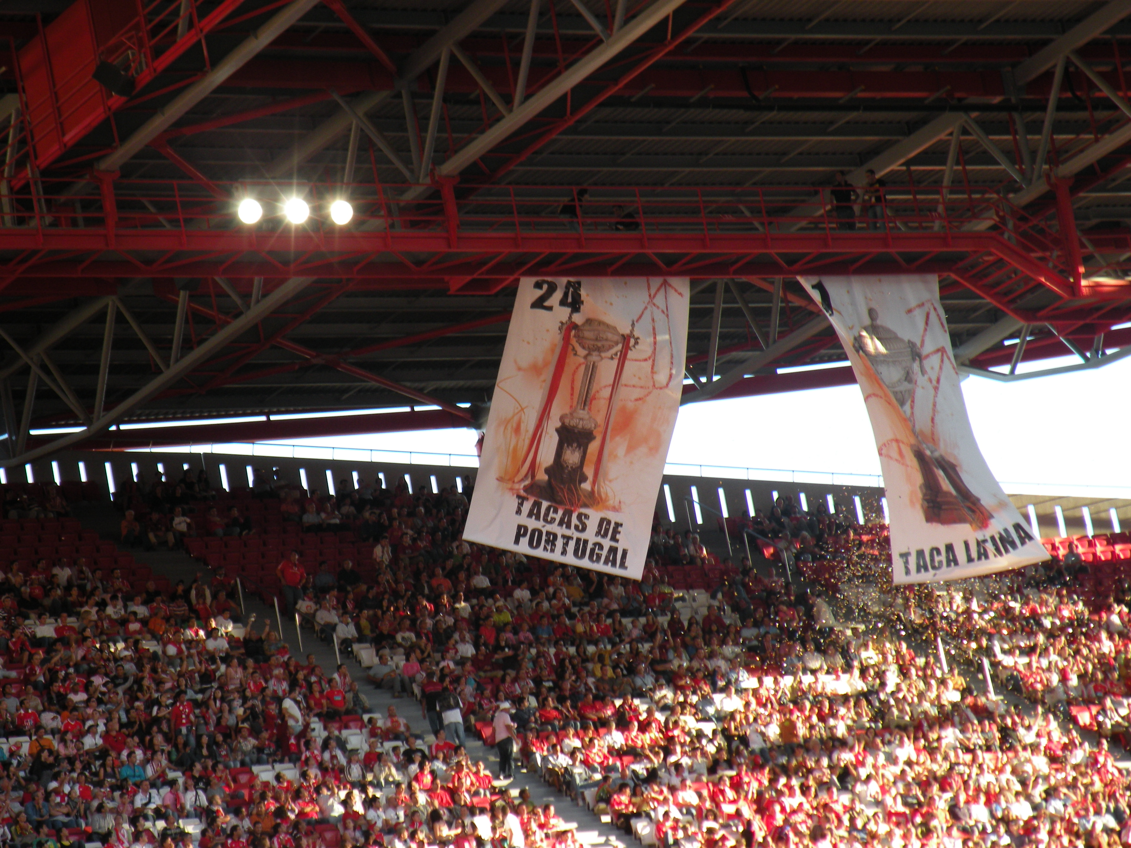 Benfica